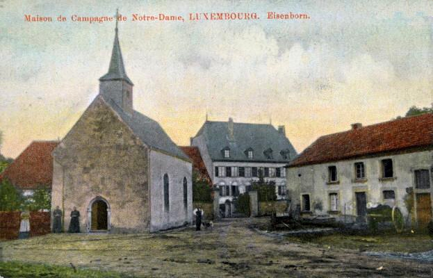 D'Schlass Eesebur "Maison de campagne Notre-Dame". This raster graphics image was created with GIMP.